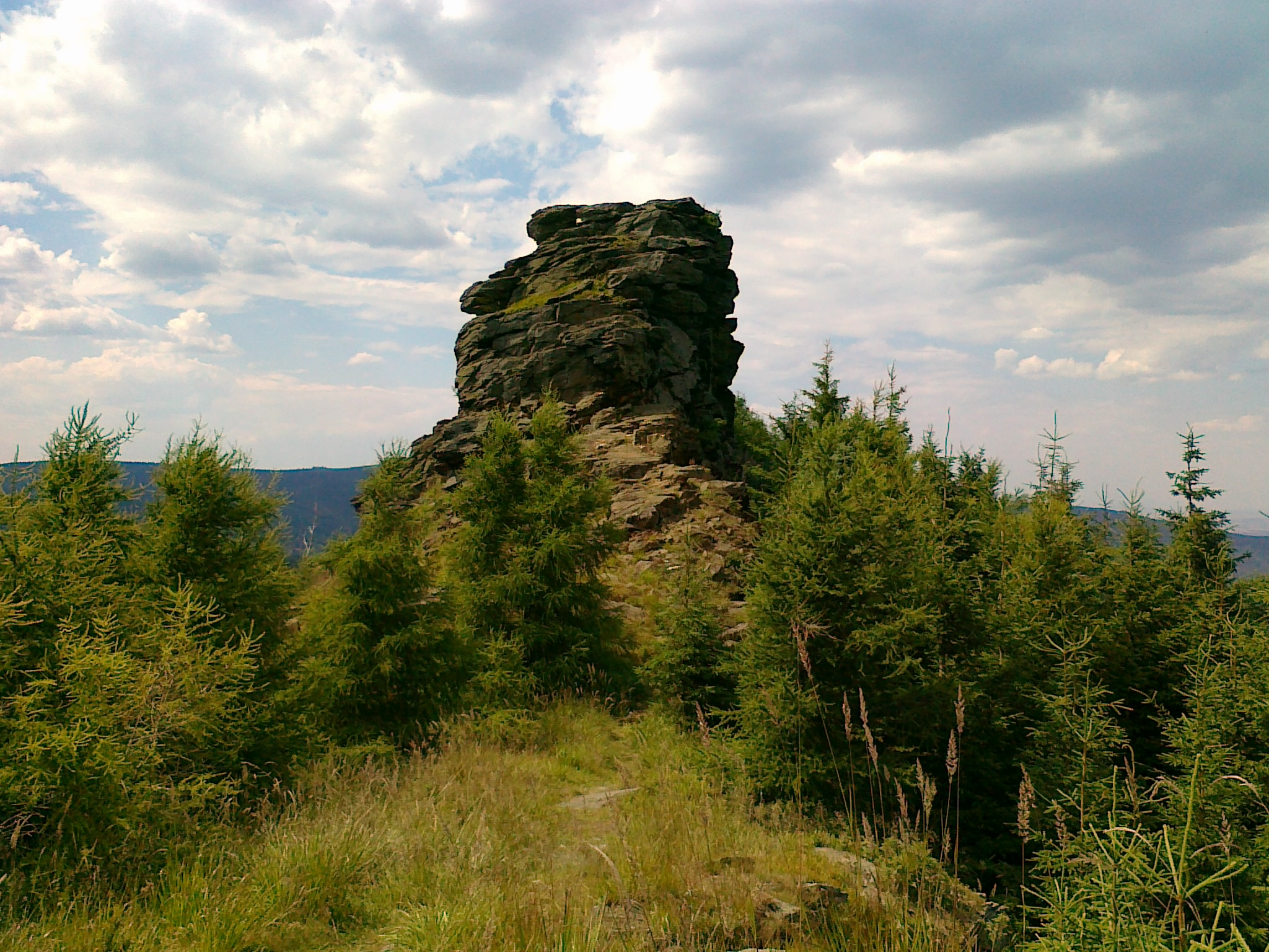 Skalisko szczytowe formacji skalnej Obří skály - 1081 m n.p.m.